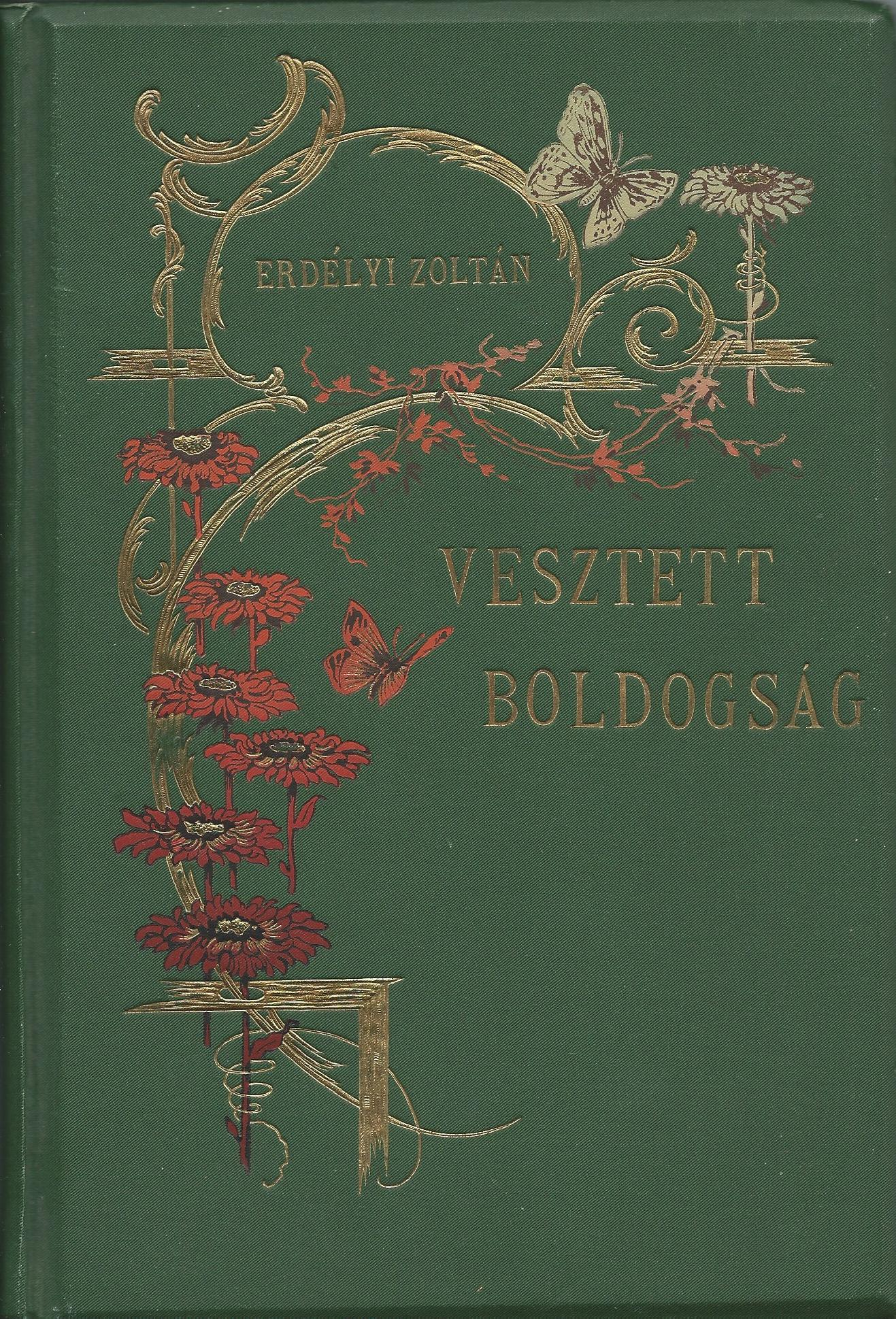 Erdélyi Zoltán (1872–1915) Vesztett boldogság c. 1898-as kiadású kötetének borítója